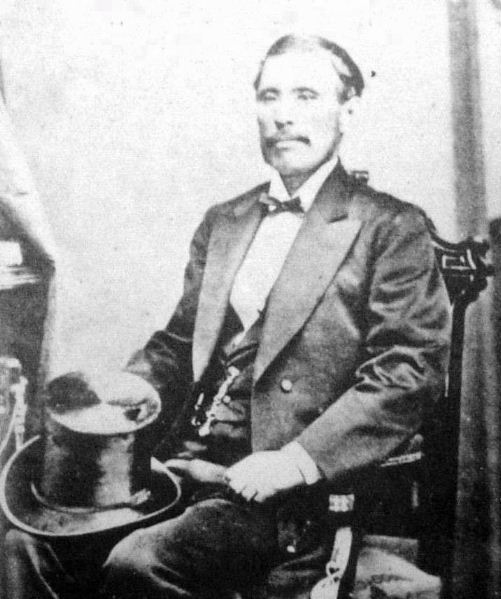 a Japanese man 大久保利通 (Toshimichi Okubo)